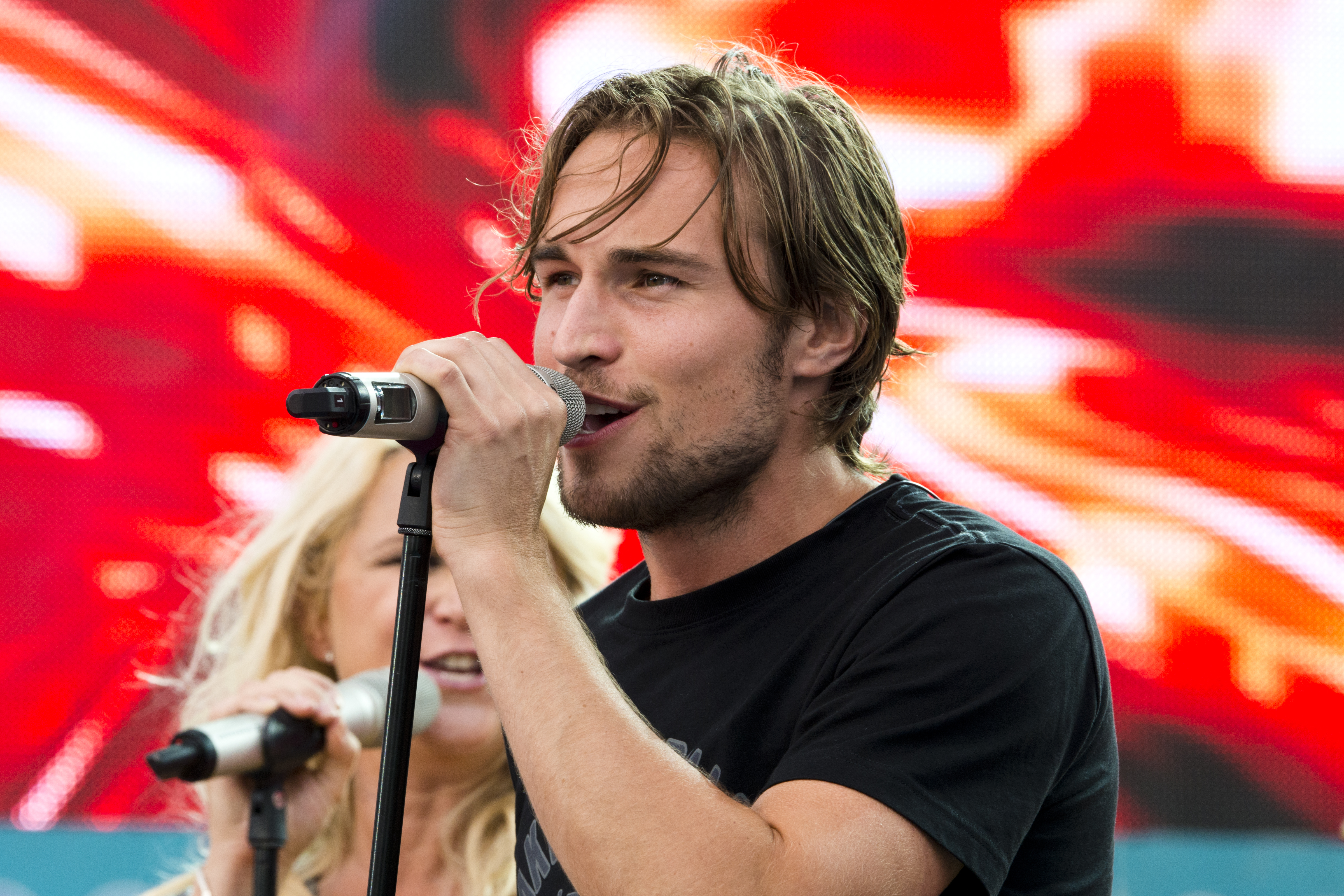 Kevin Walker på Sommarkrysset